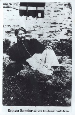 Rózsa Sándor (1813-1878) Kufstein váraban (1859-1865) Sándor Rózsa, Hungarian outlaw (in Hungarian: betyár) in the Kufstein Prison (1859-1865)